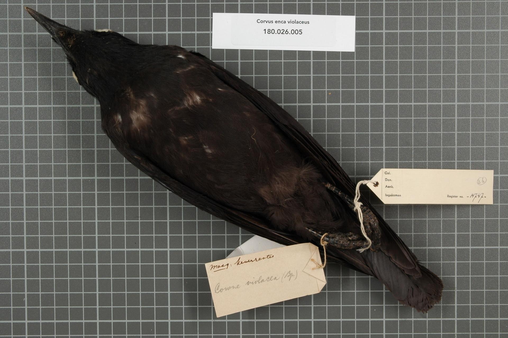 Corvus enca violaceus Bonaparte, 1851